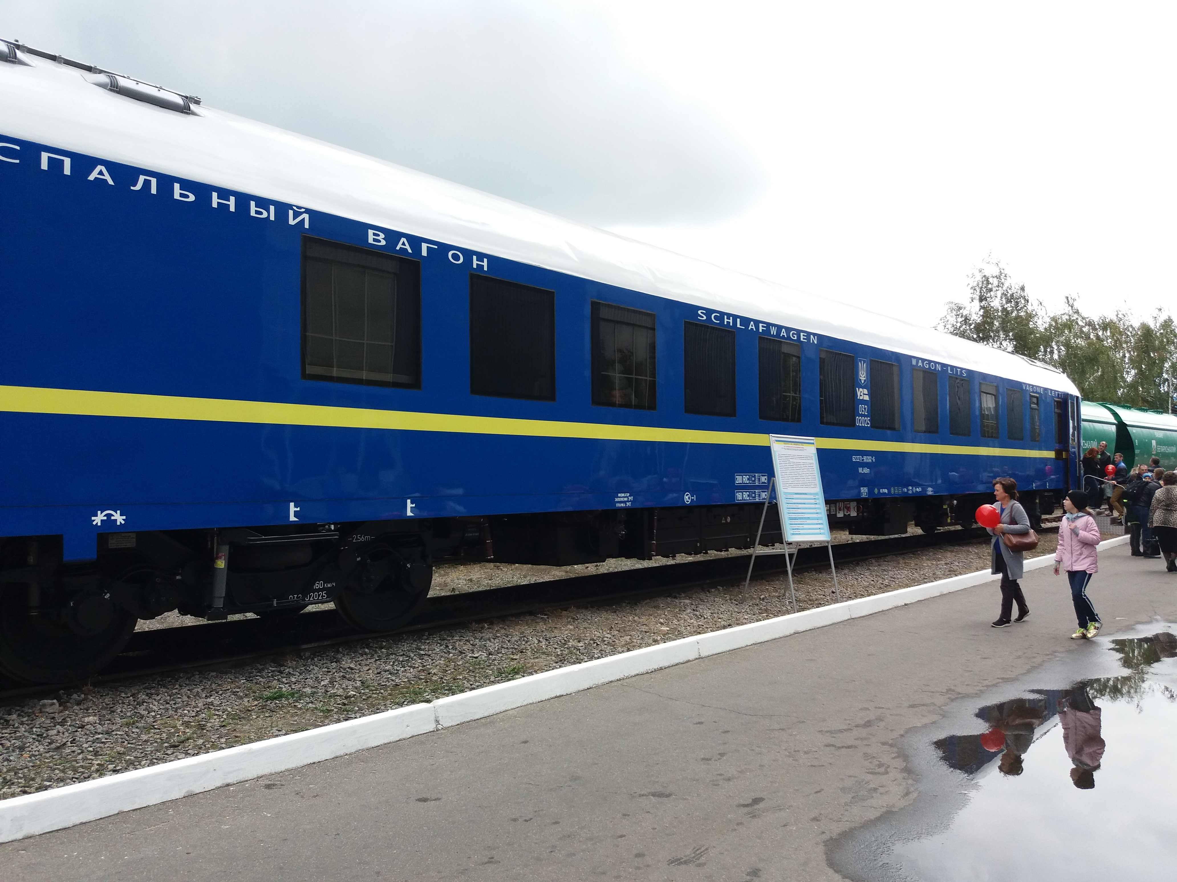 150-річчя Крюківського вагонобудівного заводу. День відкритих дверей (21 вересня 2019)